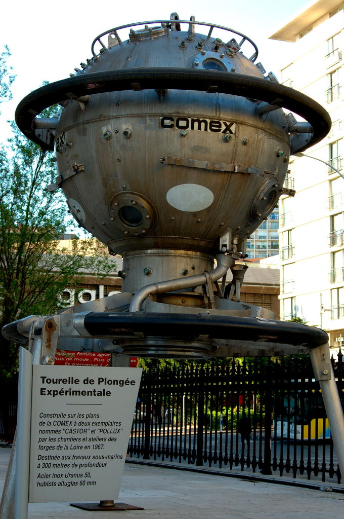 Capsule réalisée par la COMEX et exposée au Palais de la Bourse à Marseille photo faite par Christophe.moustier